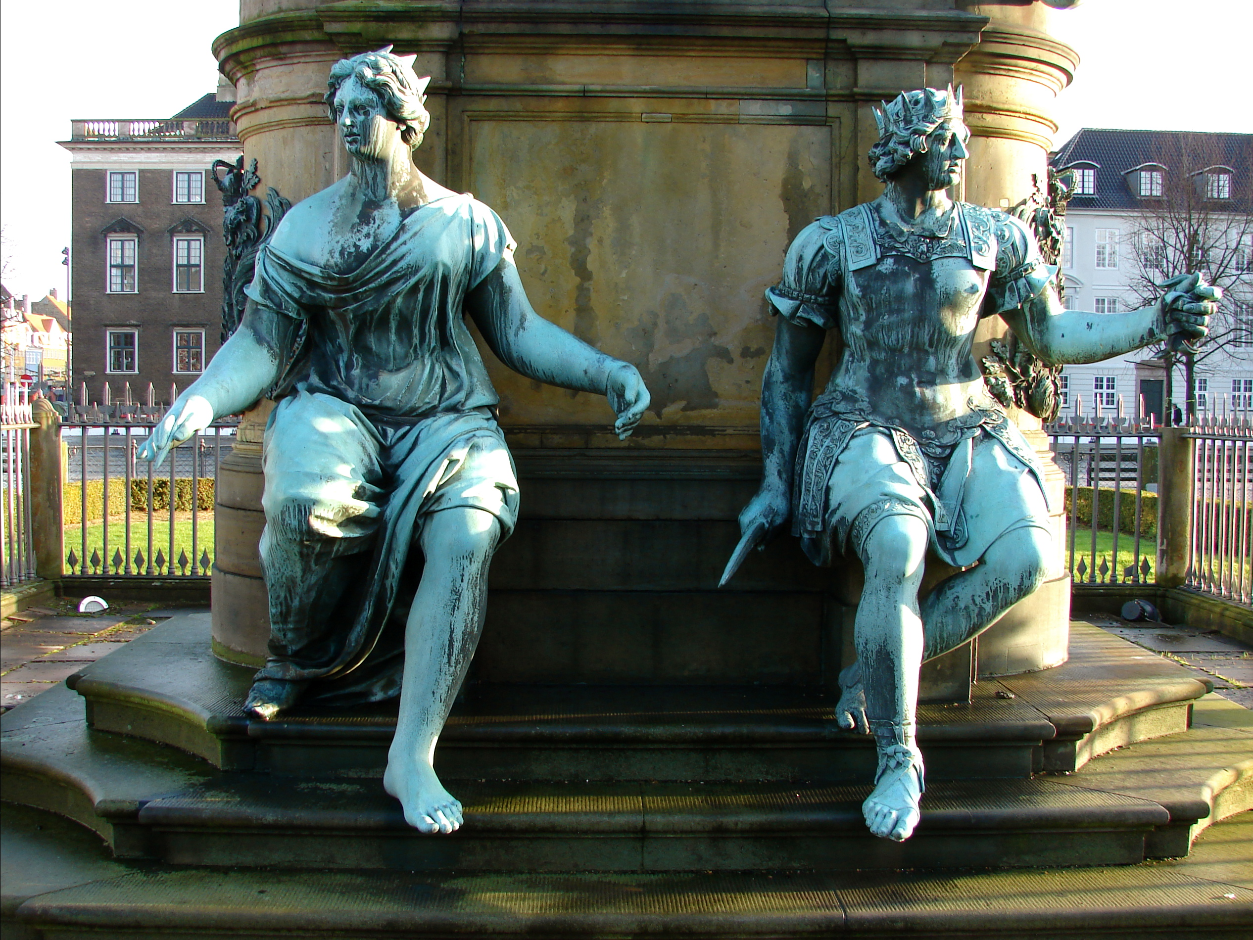 Skulpturer fra Lamoureux' rytterstatue af Christian V, Kongens Nytorv, København